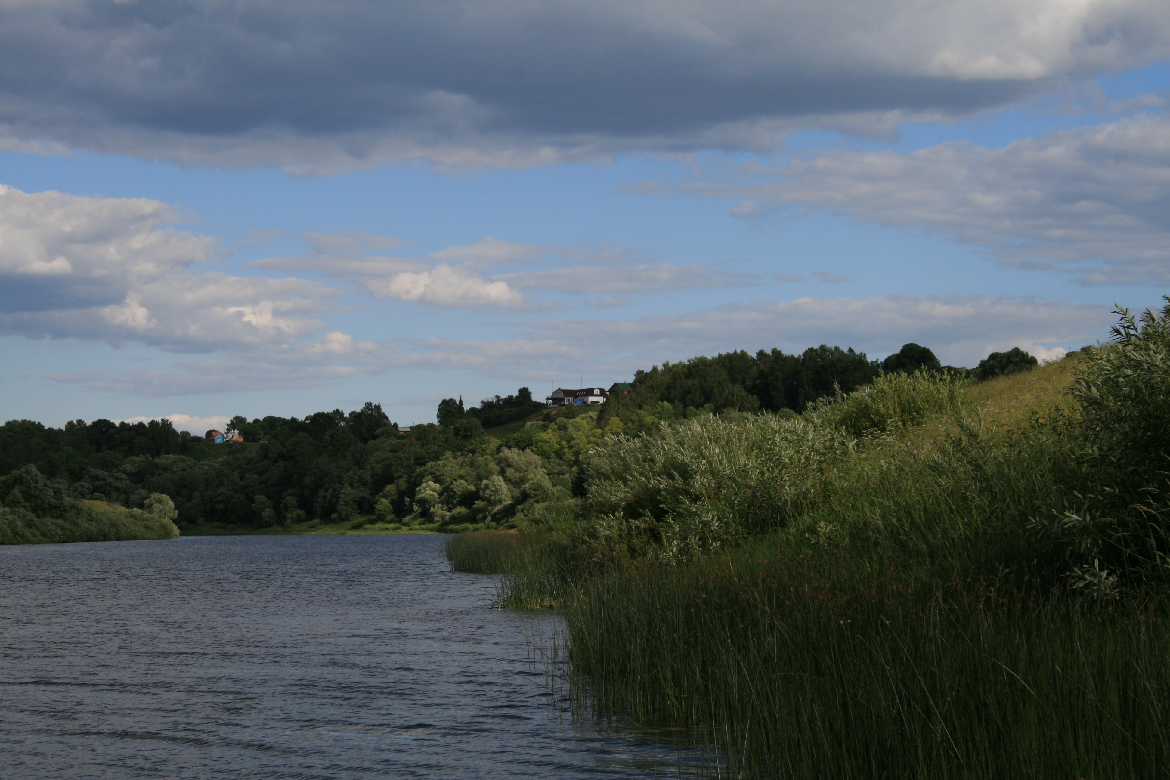 Пейзаж. Калужская область